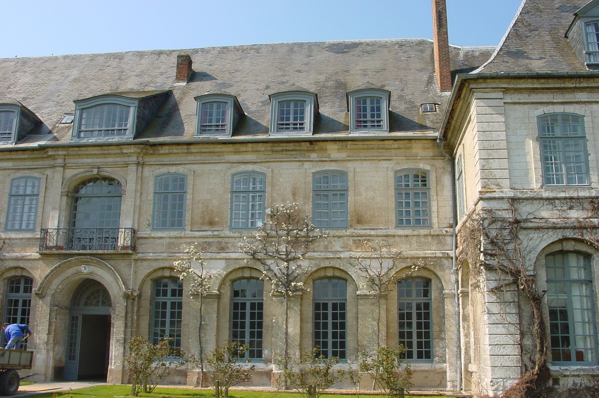 Abbaye de Valloires (Somme, France): le réfectoire des moines